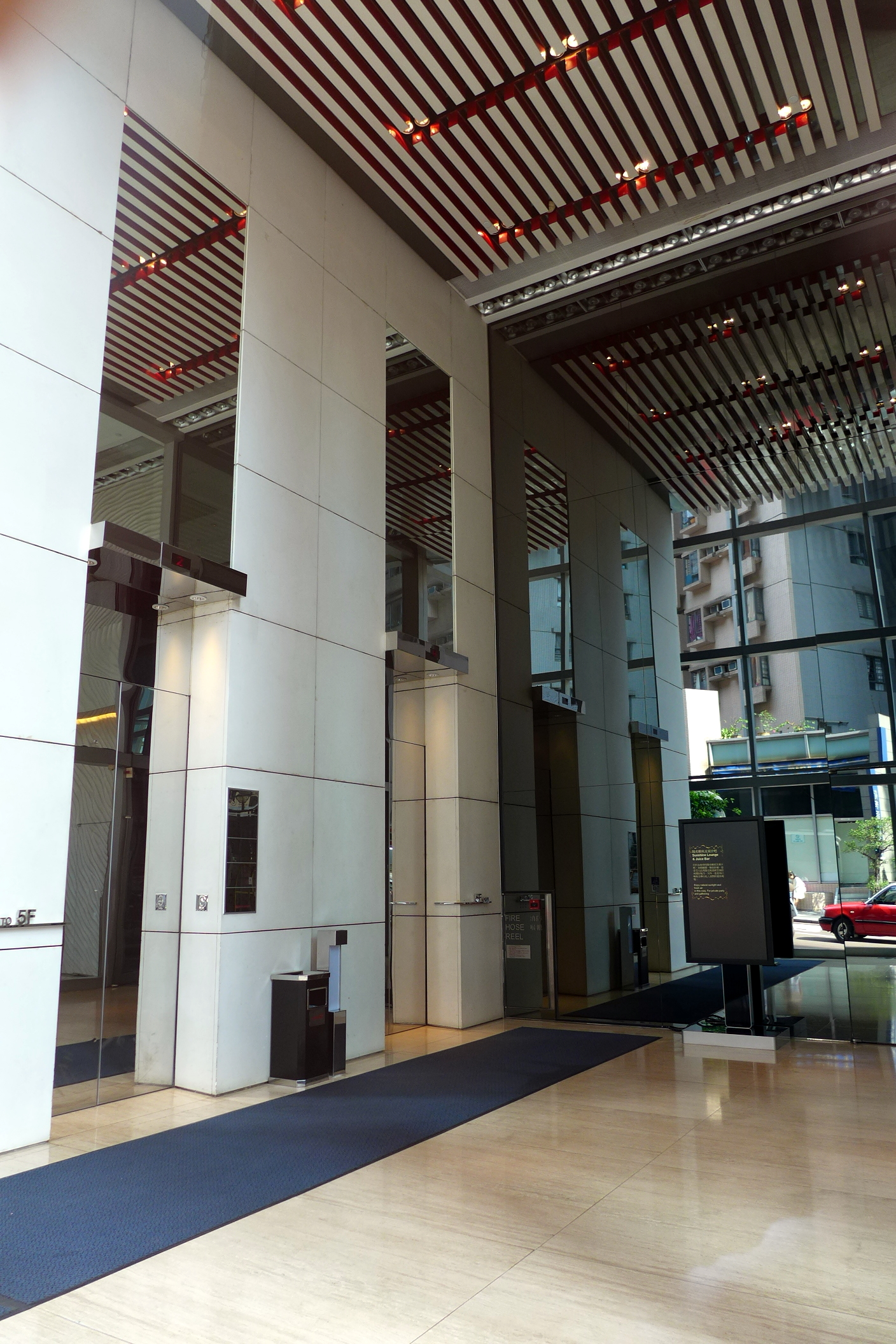 CentreStage